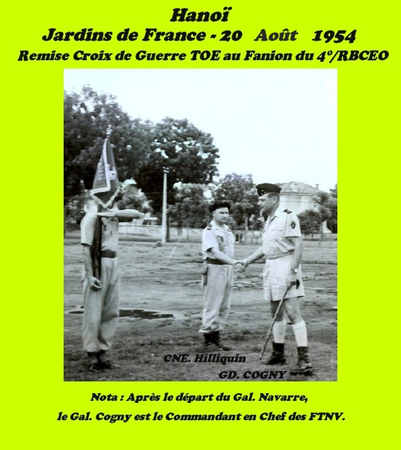 Ankunft von Generalmajor Cogny